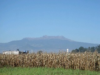 Nevado Toluca Xinantecatel self made